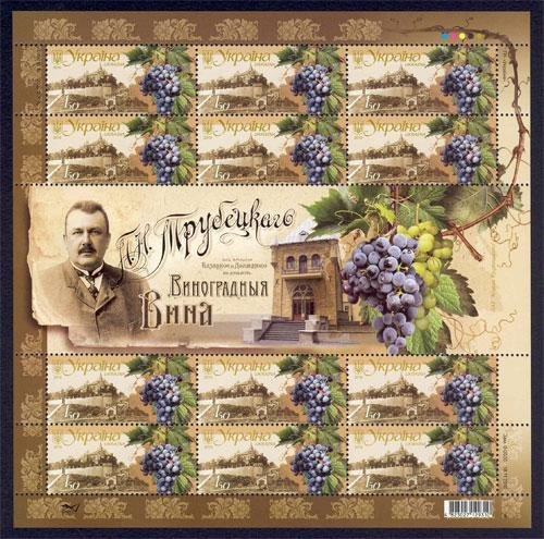 Марка України «Виноробство в Україні. Каберне Совіньйон»